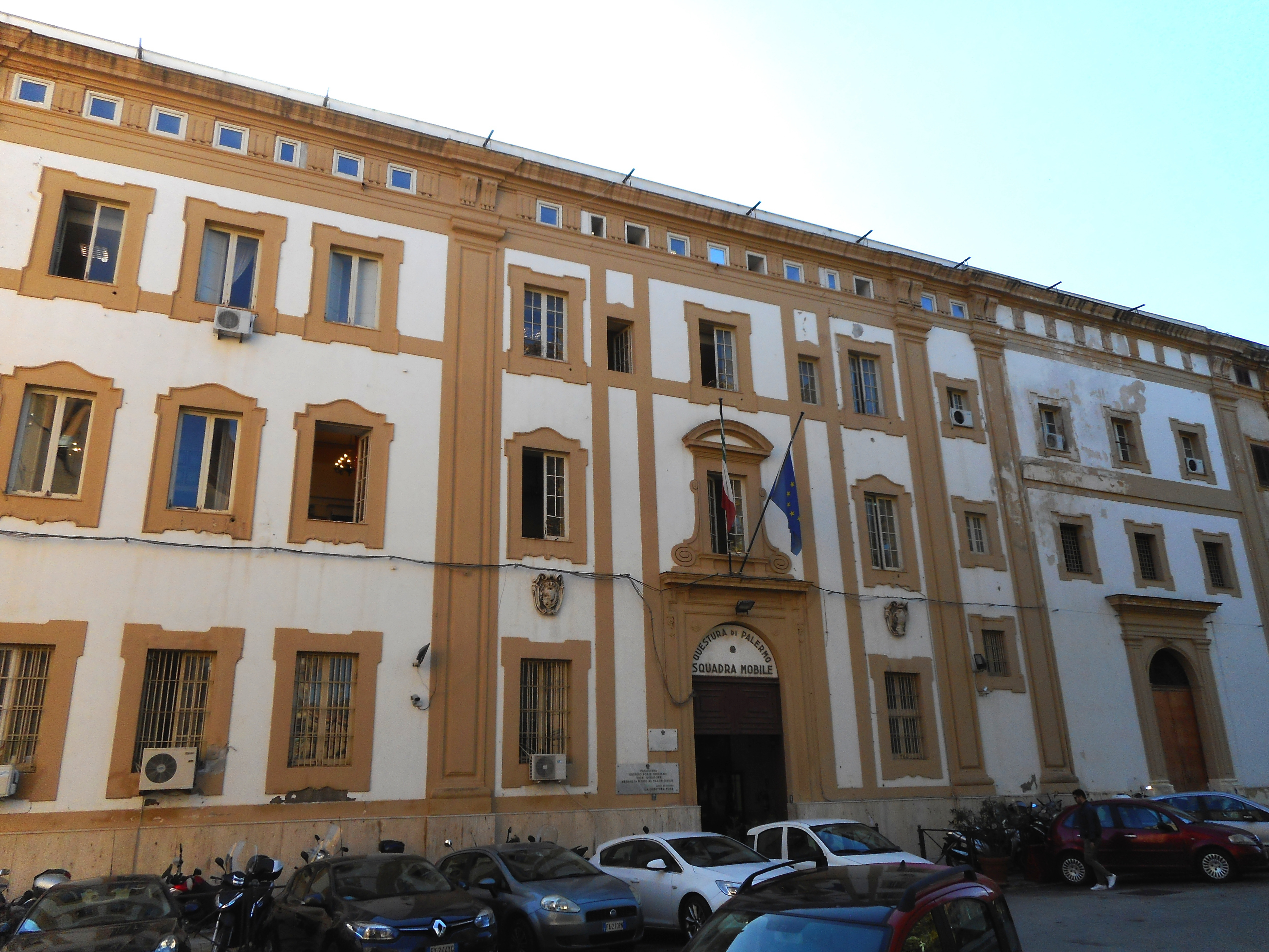 Monastero di Santa Elisabetta a piazza della Vittoria, oggi sede della Squadra Mobile della Questura